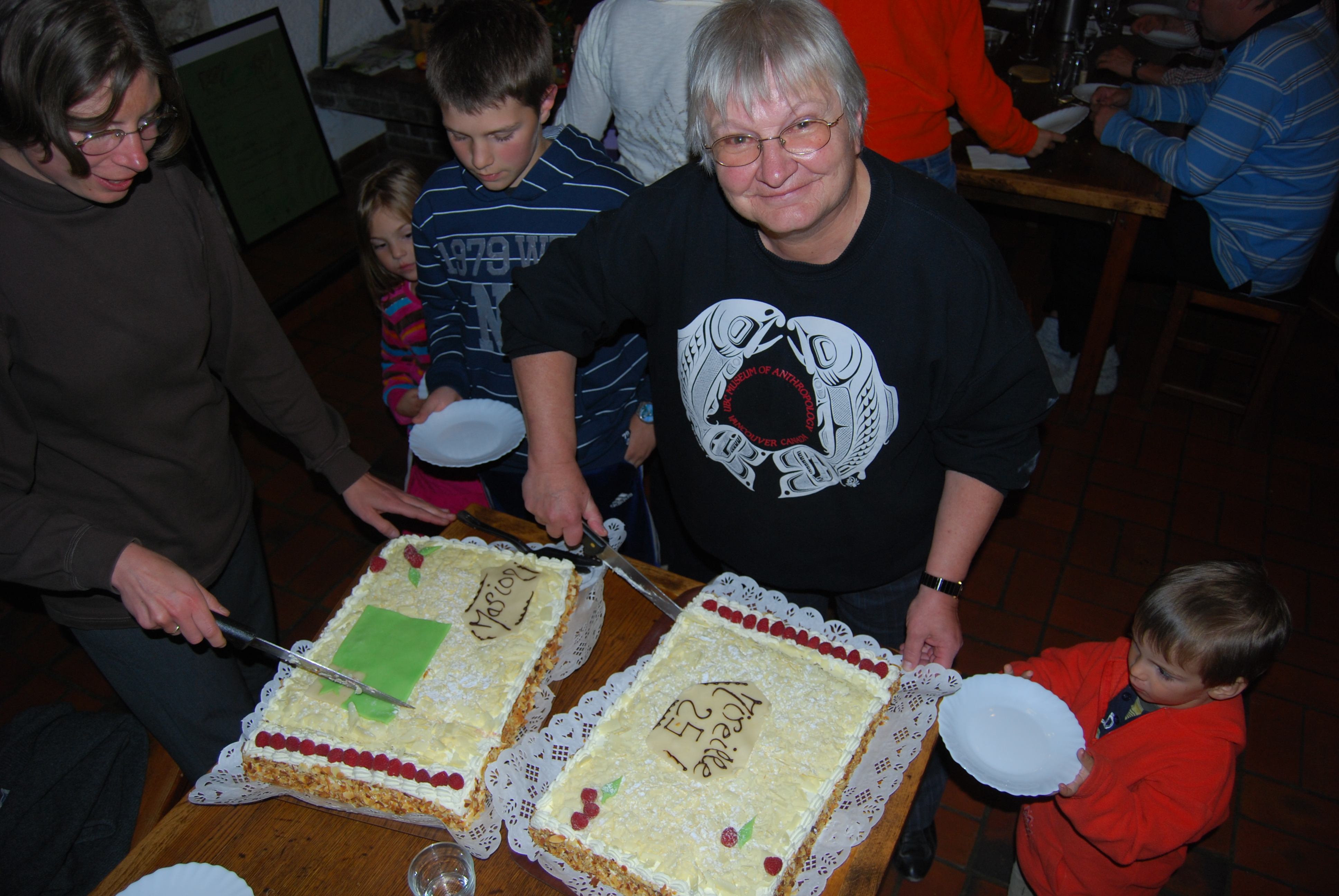 Mireille Grosjean, Copräsidentin der Schweizerischen Esperanto-Gesellschaft, feiert am Schweizerischen Familien- und Ferien-Esperanto-Treffen in Métabief ihr 25-jähriges Esperanto-JubiläumEsperanto: Mireille Grosjean, kunprezidantino de Svisa Esperanto-Societo, festas dum la Svisa Familia- kaj Feria Esperanto-Renkontiĝo en Métabief sian 25-an Esperanto-jubileon